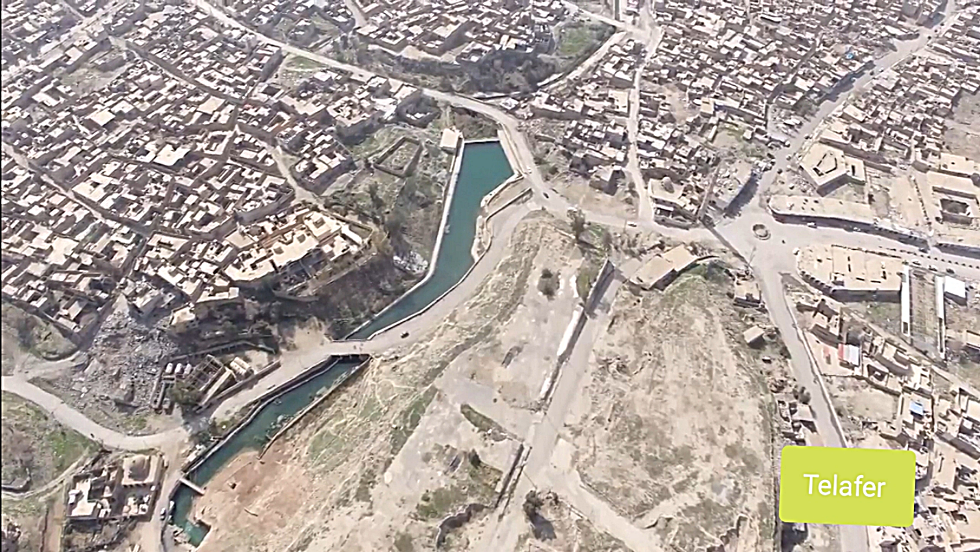 Drone_telafer